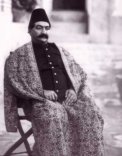 Mas'ud_Mirza_Zill_al-Sultan